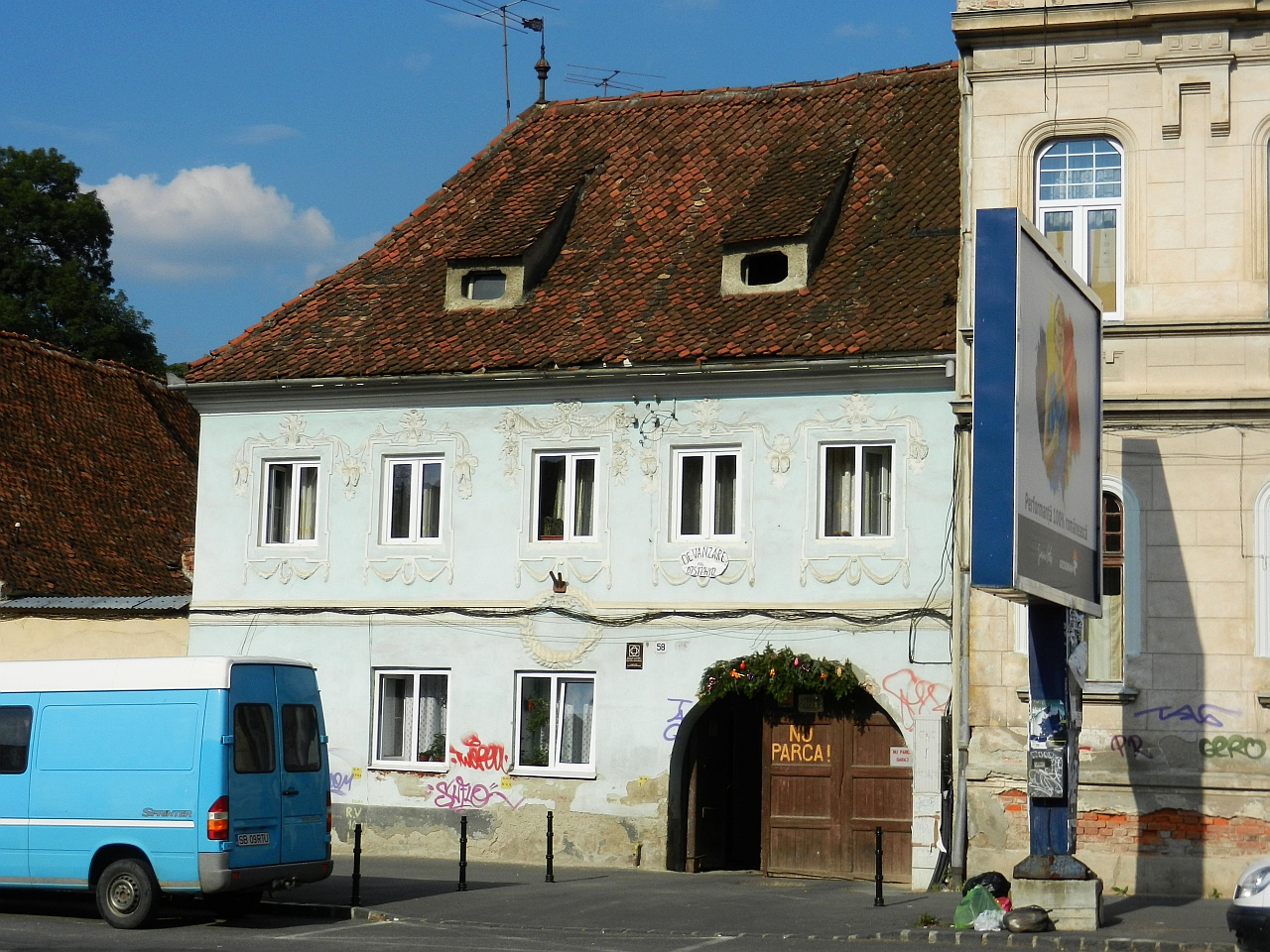 Casa monument istoric (Lunga 58)